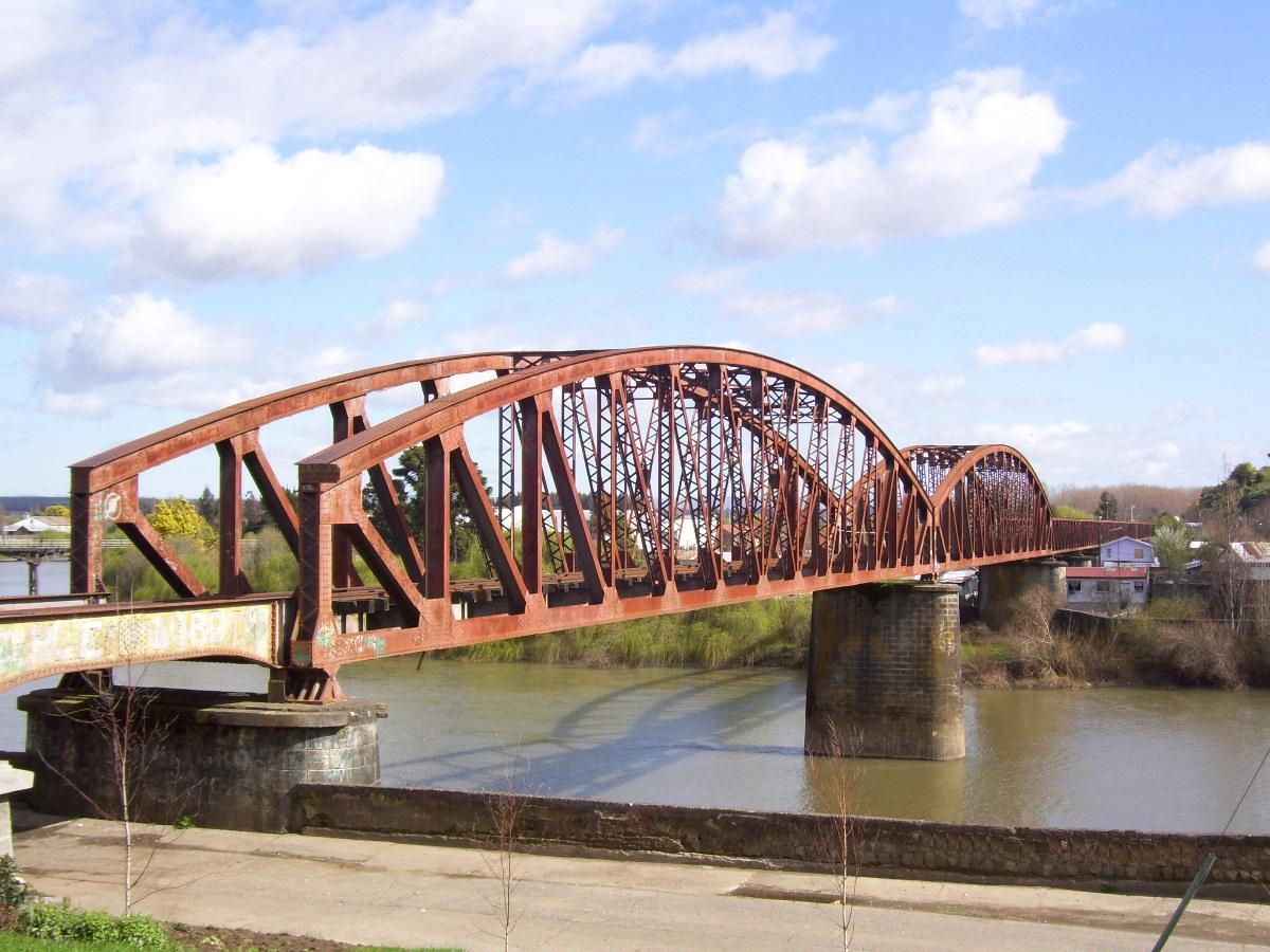 Puente en la ciudad de Nueva Imperial, Región de la Araucania, Chile.